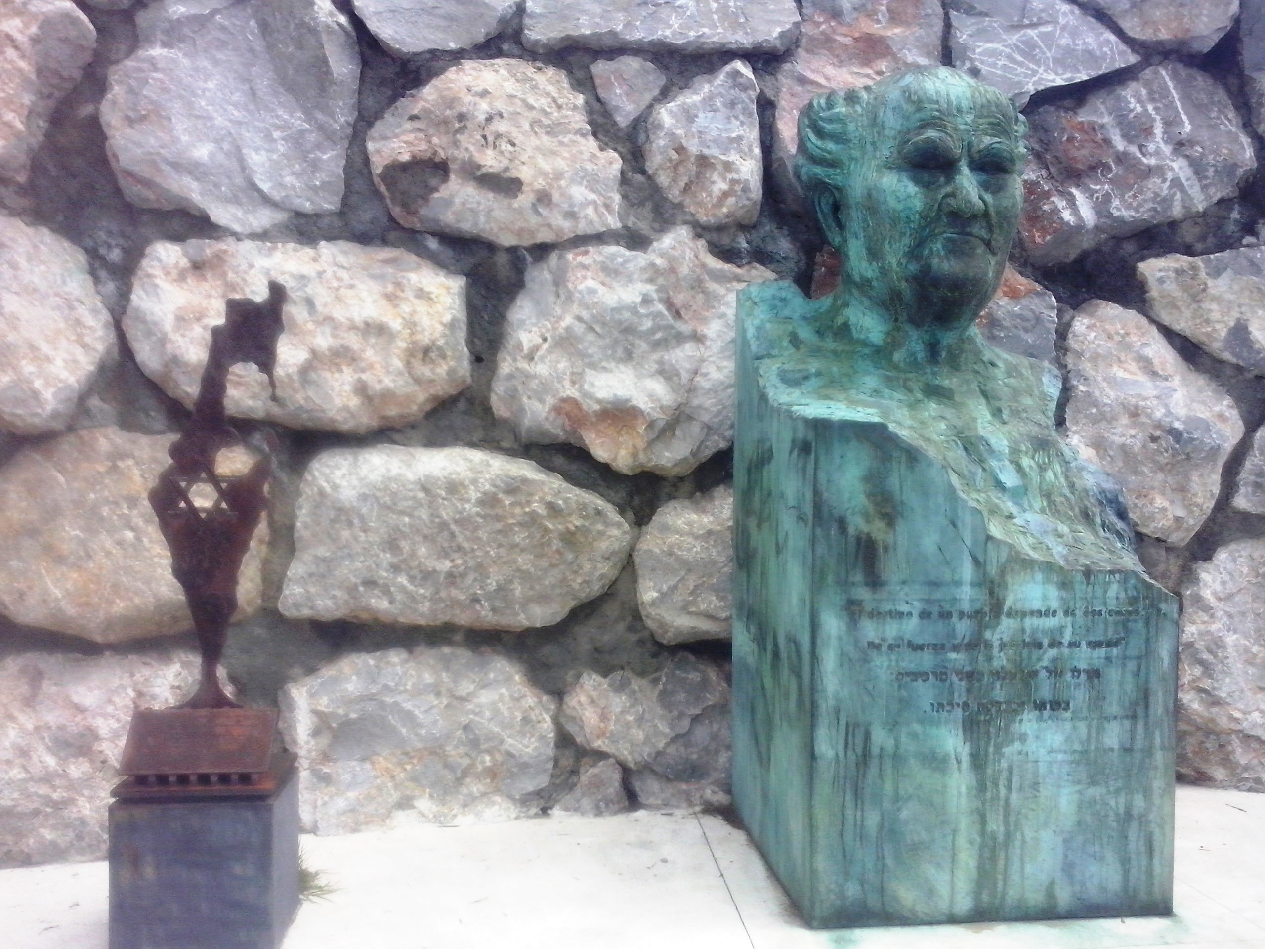 Monumento a David Ben Gurión en el Parque David Ben Gurión en la ciudad de Pachuca de Soto, México.